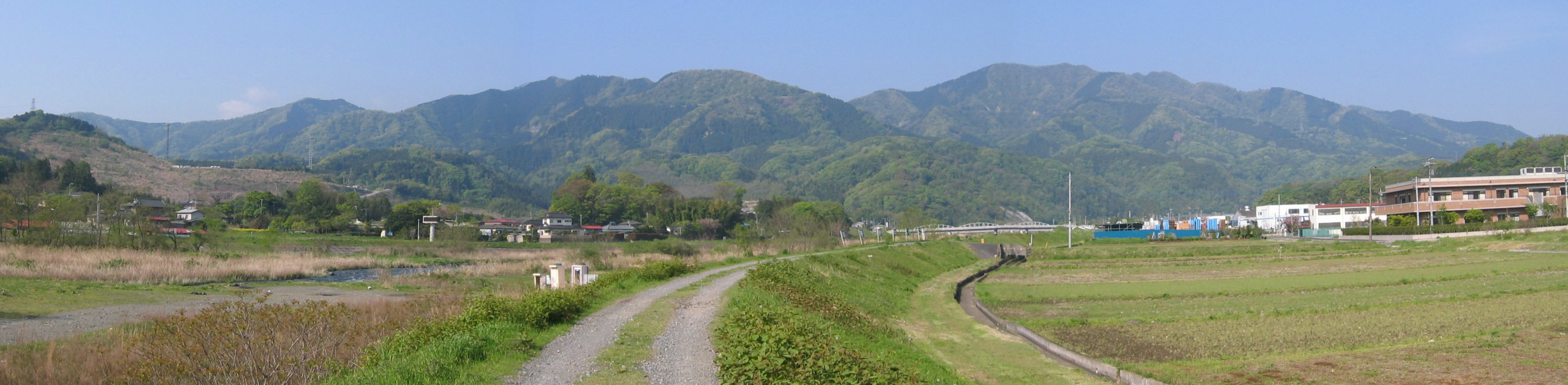 愛川町の中津川沿いの道より仏果山、経ヶ岳などの山々。